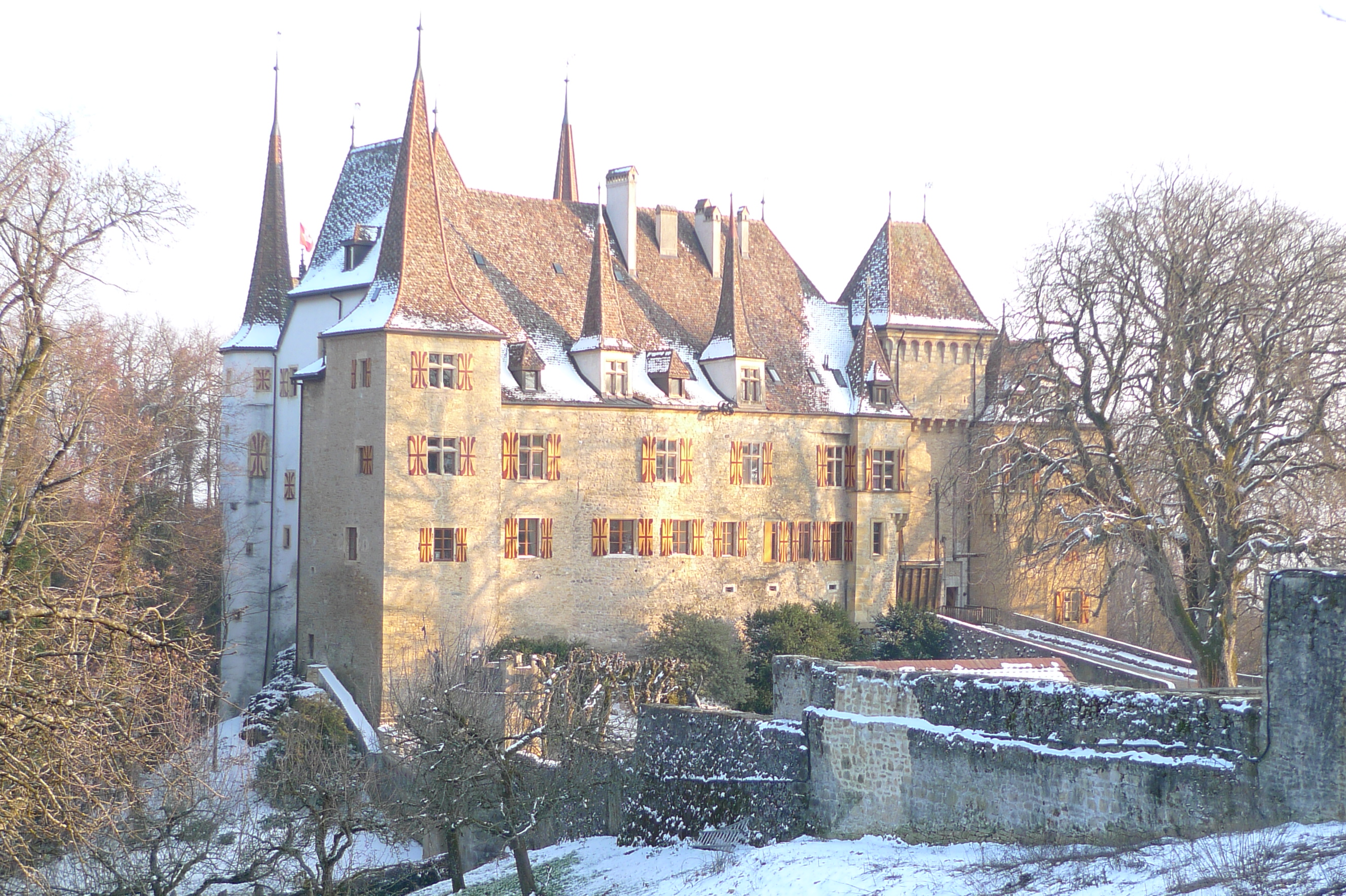 Littoral neuchâtelois